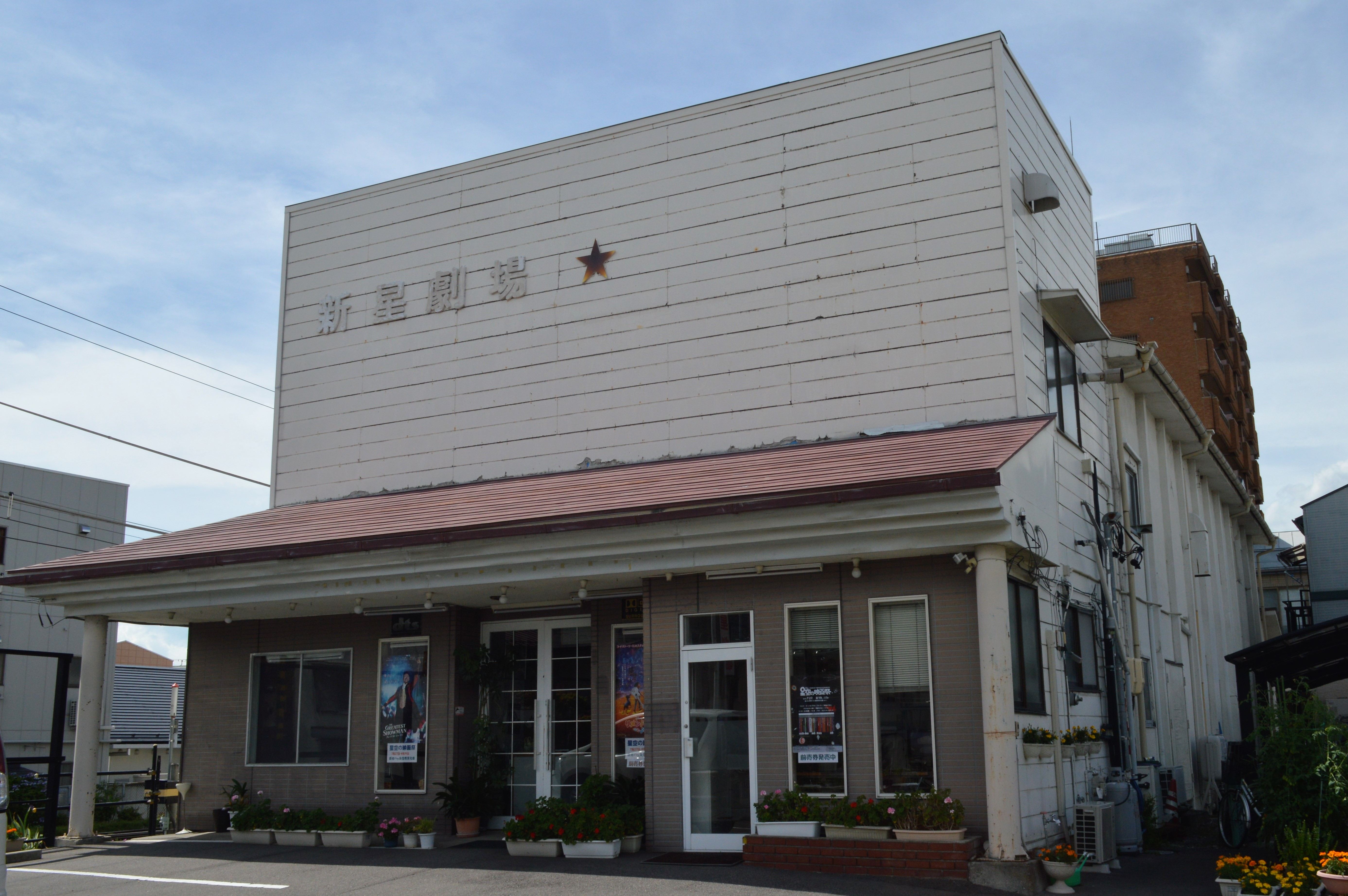 長野県茅野市の茅野新星劇場。